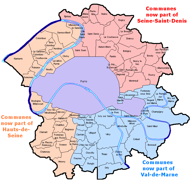 Seine département and its 81 communes as it existed between 1929 and 1968